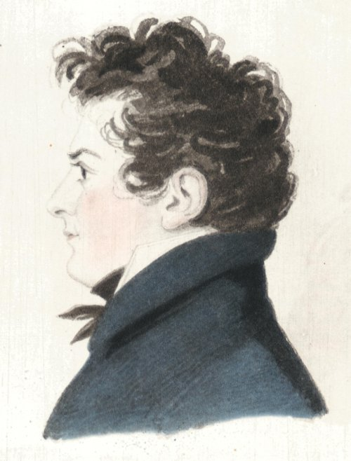 Esaias Tegnér (1782-1846)